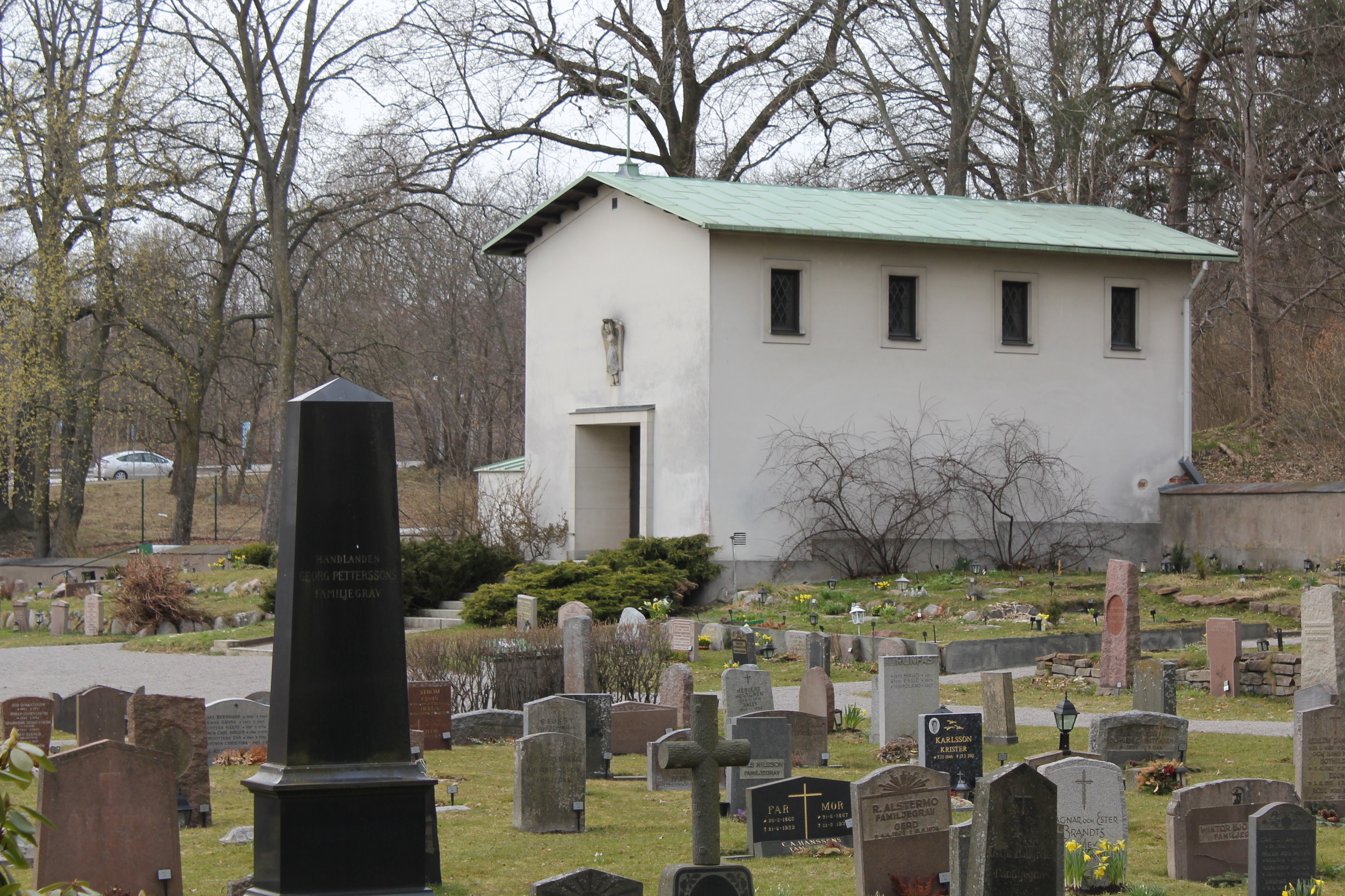 Gravkapell vid Brännkyrka kyrka i stadsdelen Örby slott, Stockholm.